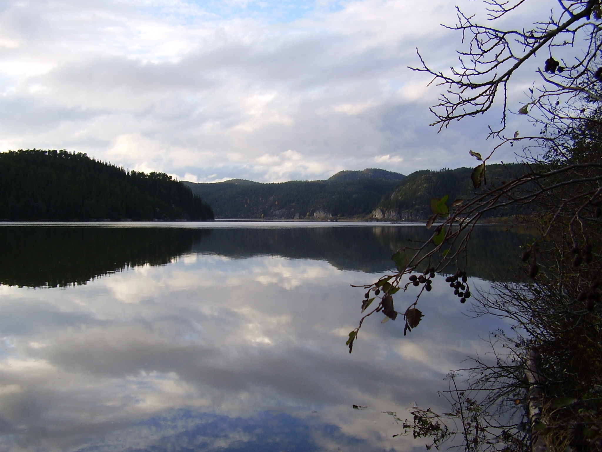 Der Fluss Namsen bei Kvatningen, Overhalla kommune, wenige Kilometer vor der Mündung. Namsen river near Kvatningen, Overhalla kommune, a few miles to its estuary.